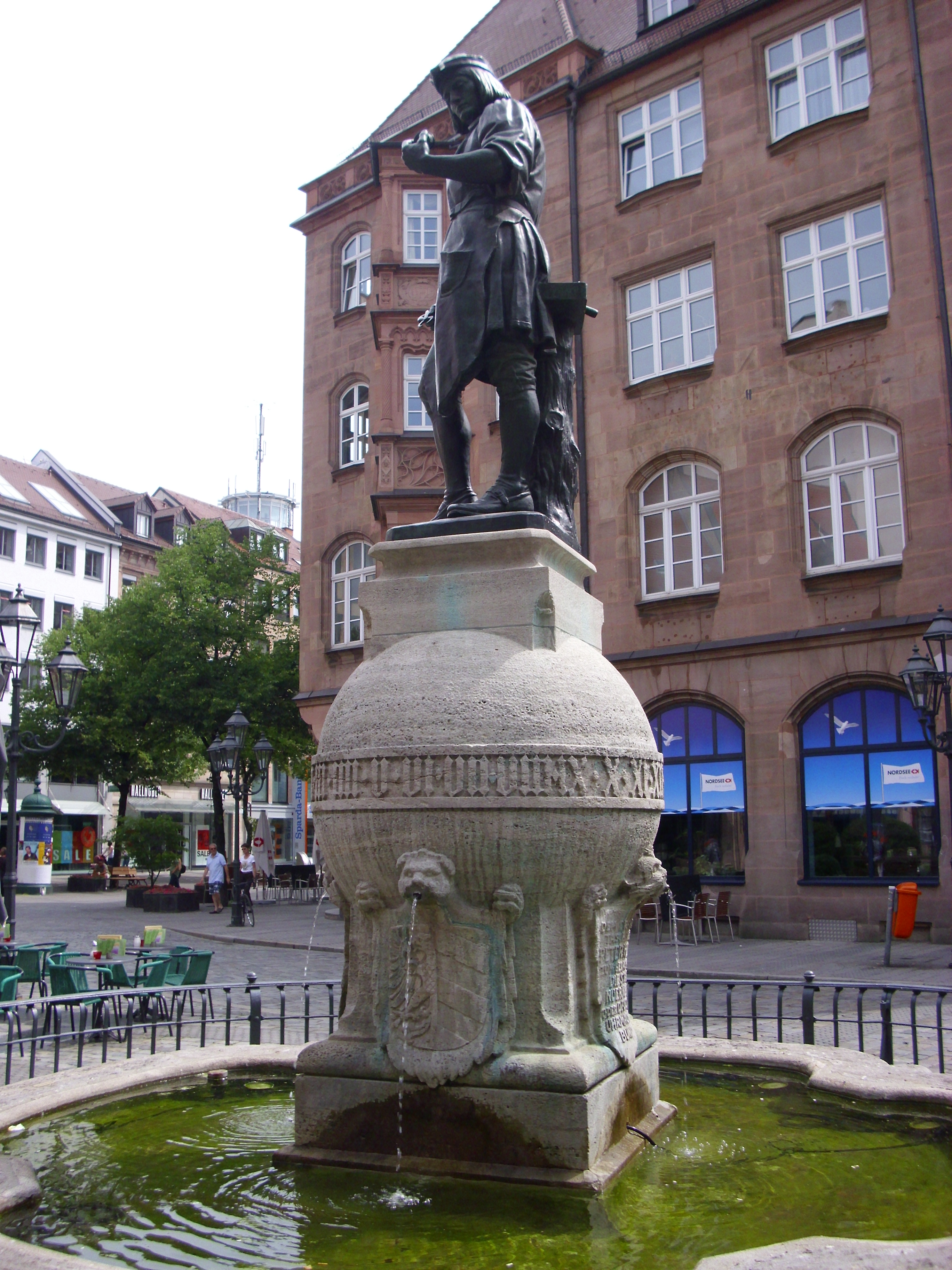 Peter-Henlein-Brunnen Juli 2010 02